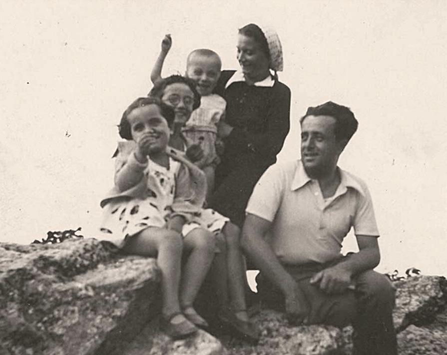 פוקריני עם רעייתו וילדיו